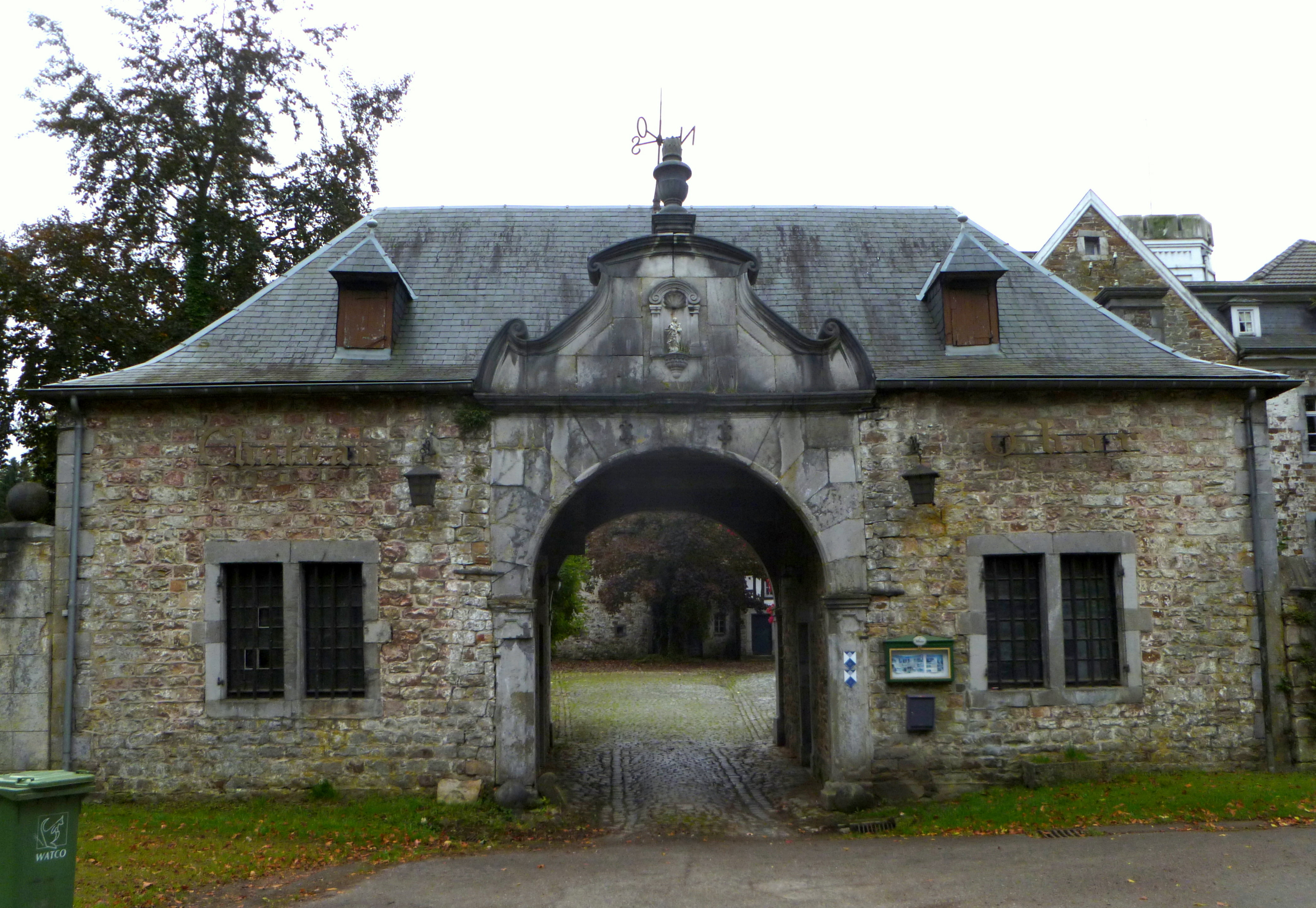 Torhaus Schloss Thor in Astenet bei Walhorn; Architekt: Johann Joseph Couven